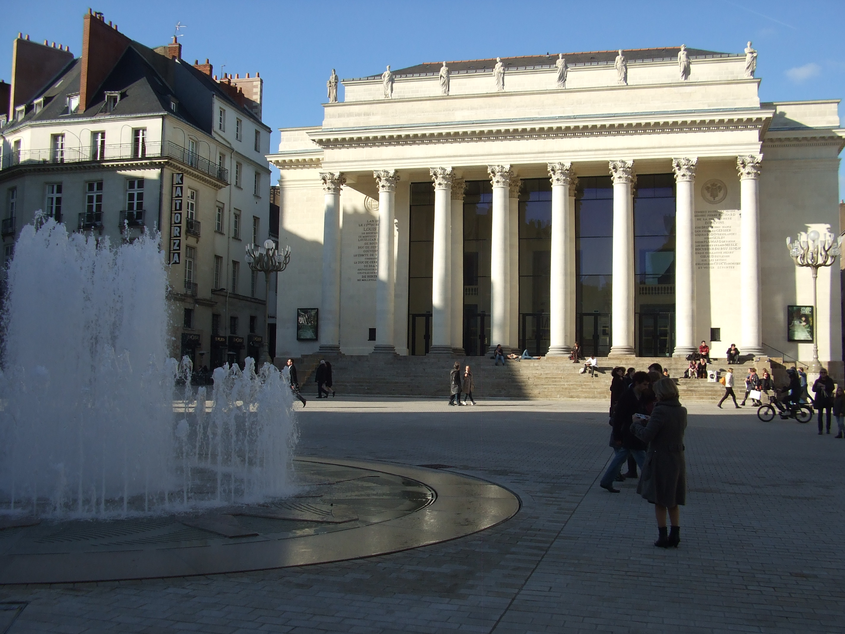 Nantes, Place Graslin - La théâtre et la fontaine - Mars 2014